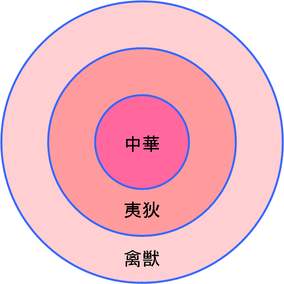 中華思想概念図